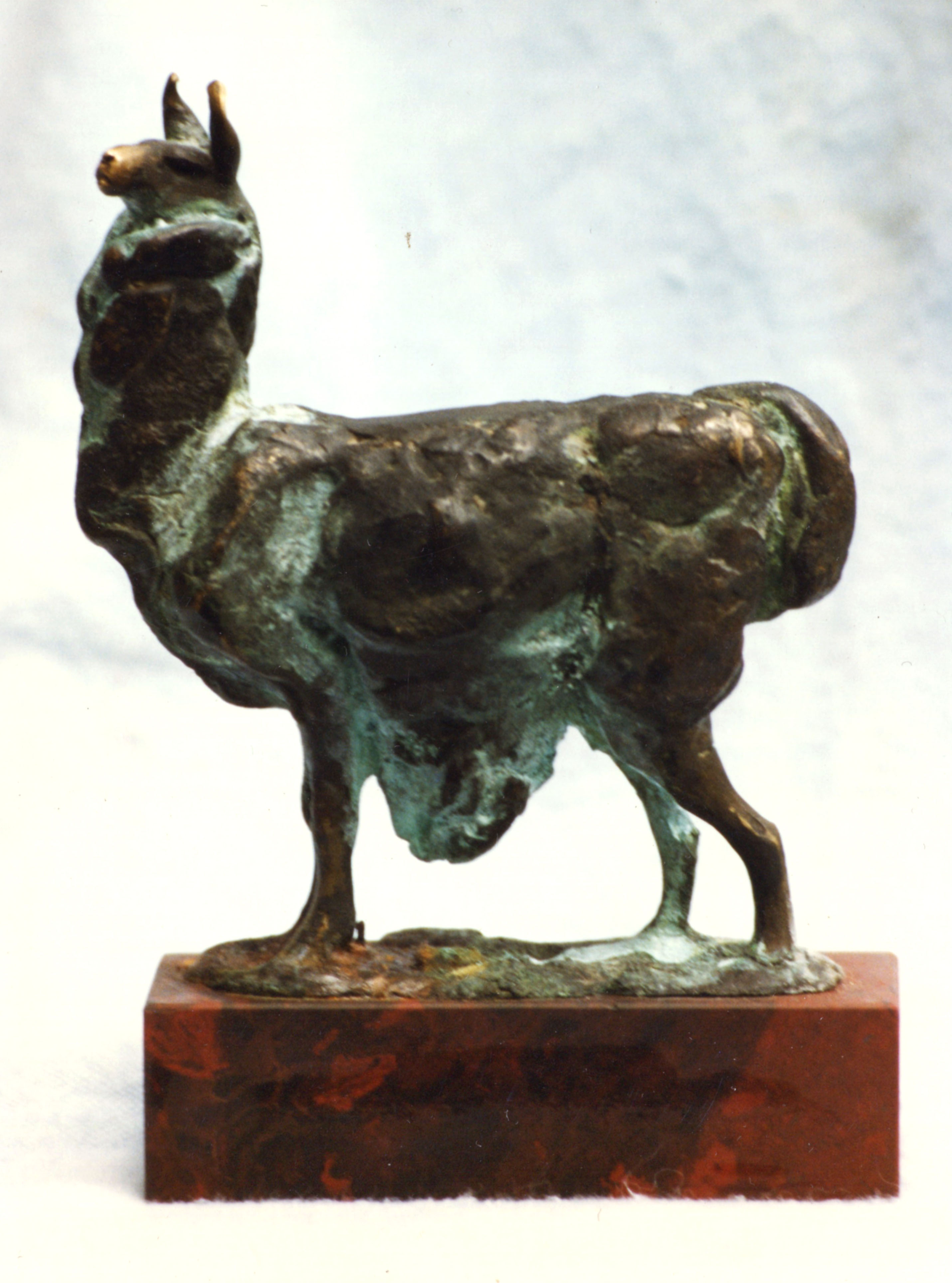 Работа скульптора-художника Николаева Е.В.